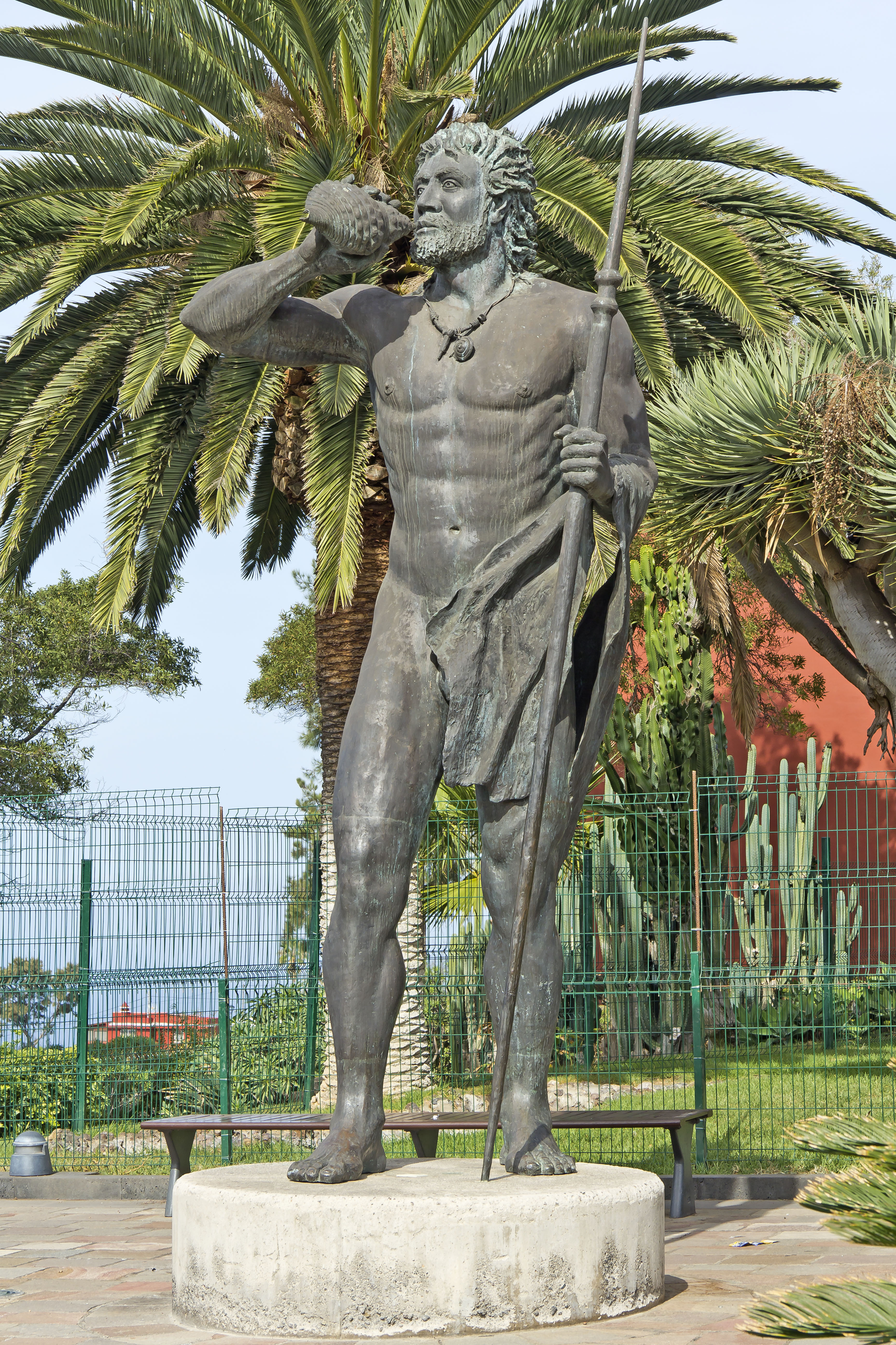 Die Bronzeplastik, die den Guanchen Tinguaro darstellen soll, steht in La Matanza de Acentejo auf der Insel Teneriffa. Sie wurde von Miguel Ángel Padilla geschaffen.